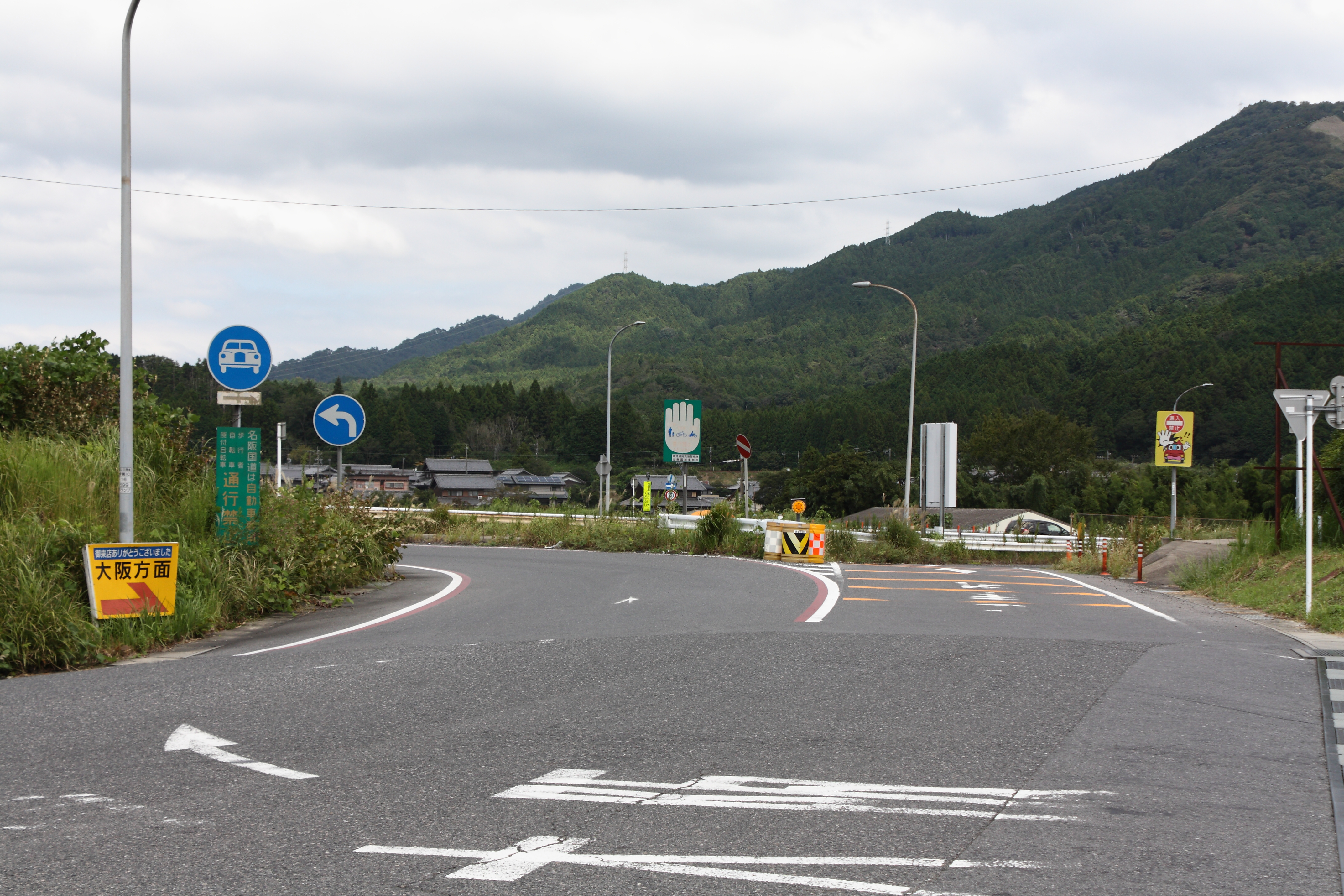 名阪国道 伊賀インターチェンジ 天理方面出入口 三重県伊賀市柘植町